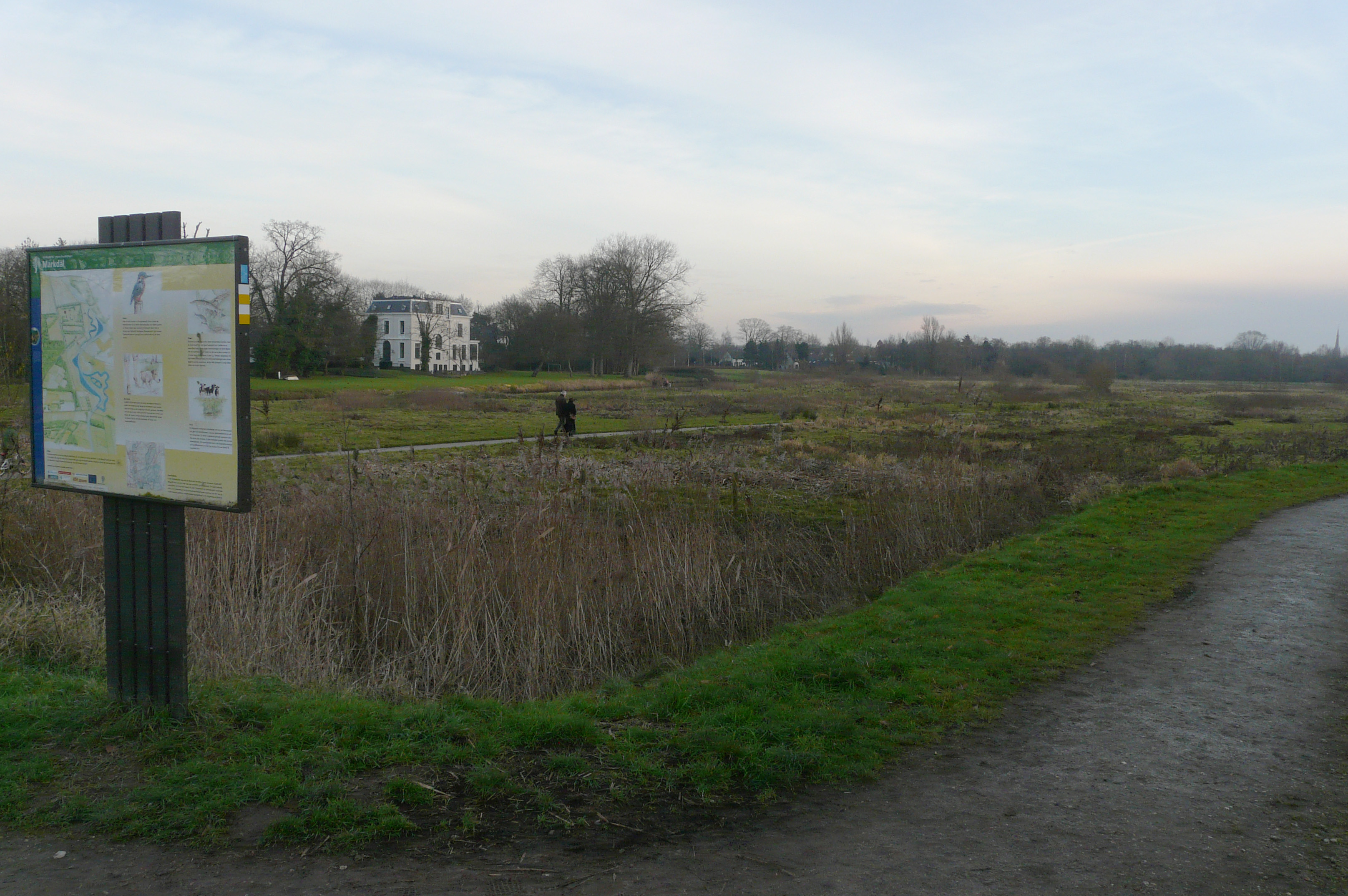 Zicht op het Markdal nabij de wijk Ginneken in het zuiden van Breda